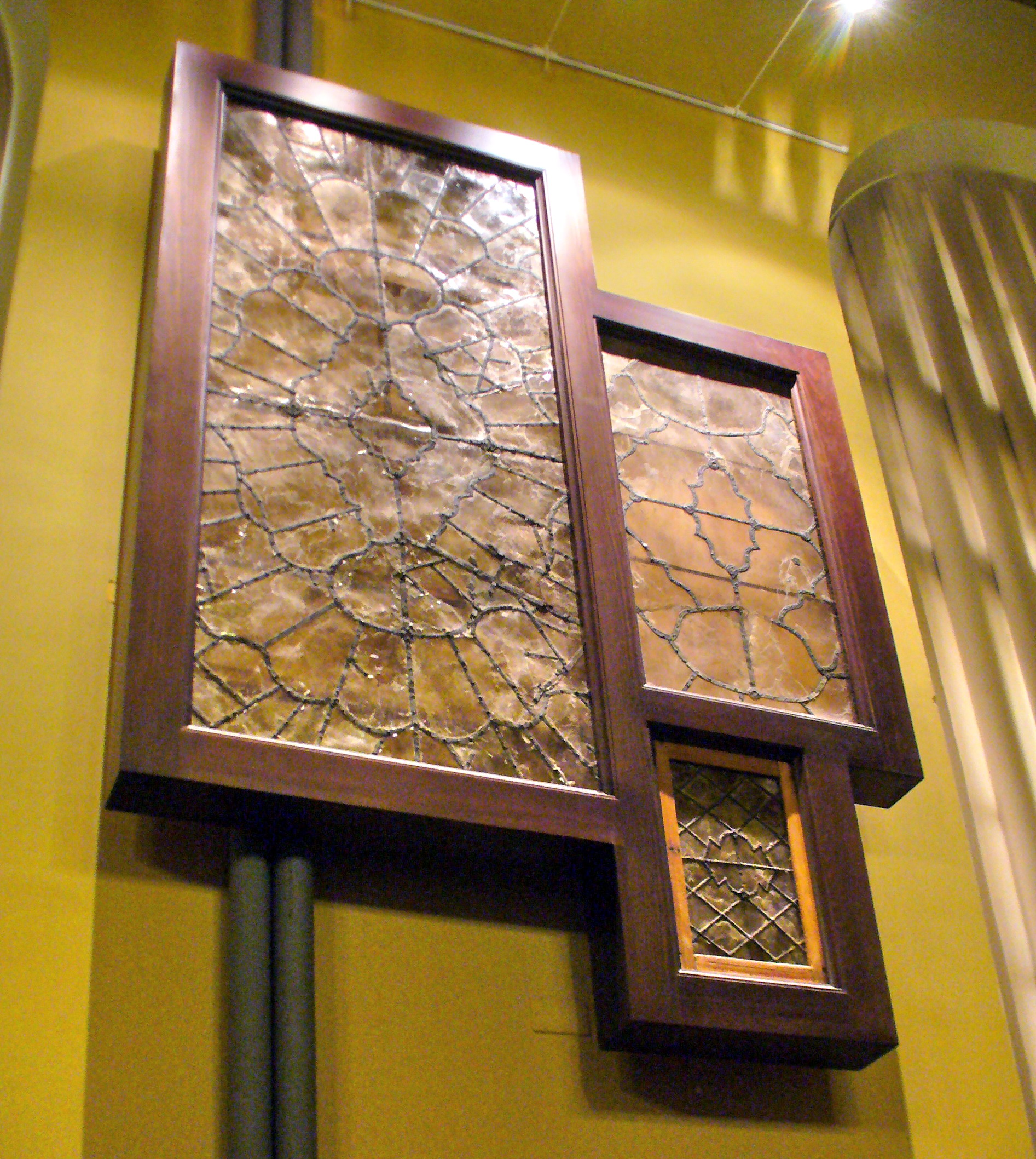 Слюдяное окно. Россия, конец XVII - начало XVIII века. Дерево, слюда, олово.